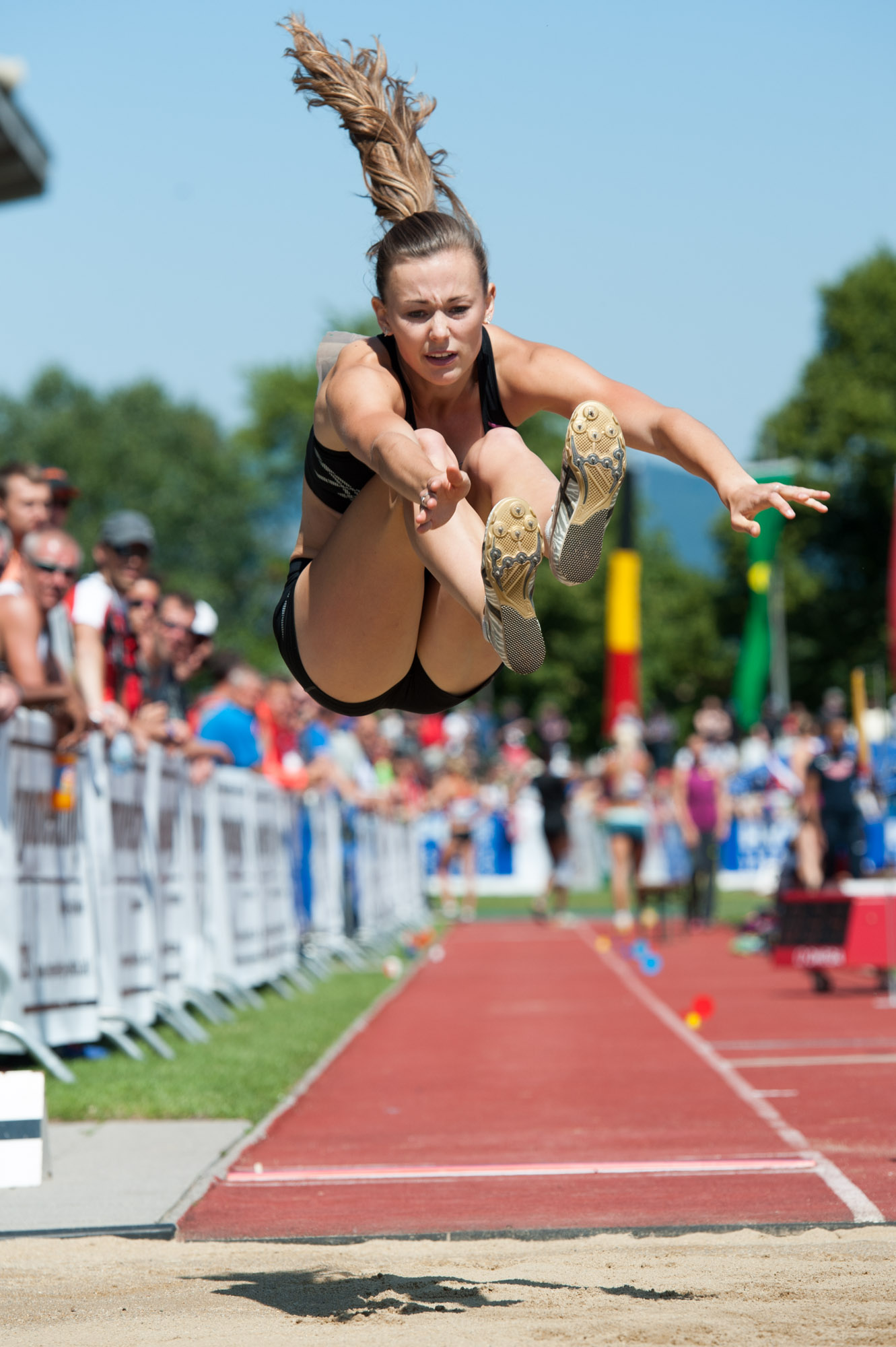 Nadine Visser in actie tijdens de Hypo-Meeting 2014 in Götzis.